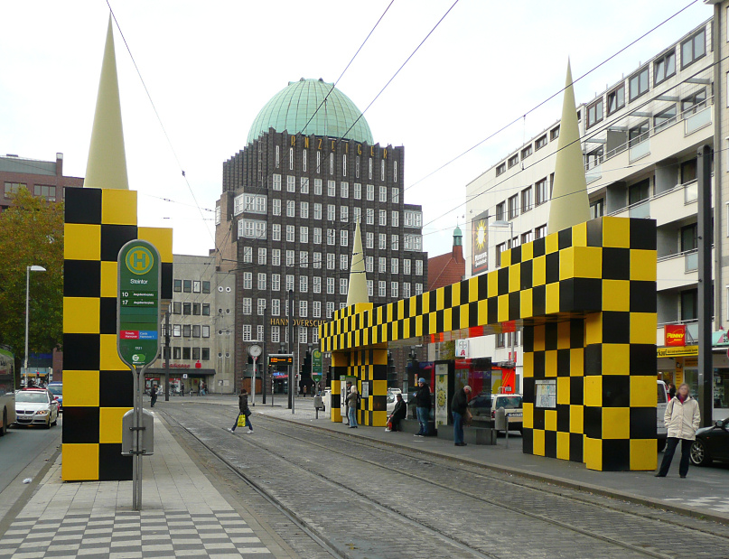 Ehemalige Stadtbahn und Omnibushaltestelle Busstop Steintor in Hannover.